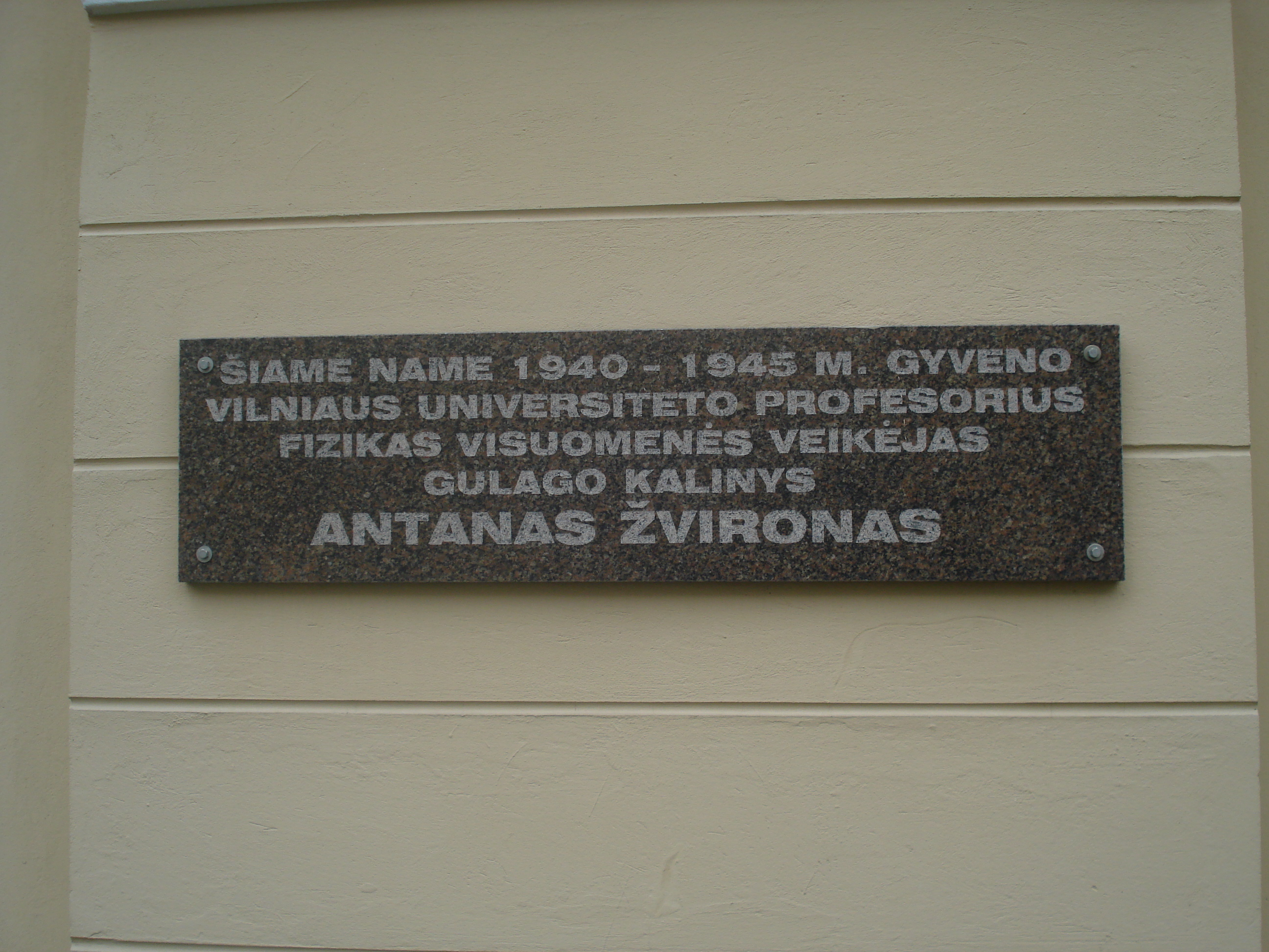 Memorial plaque: prof. Antanas Žvironas (Didžioji g. 4)